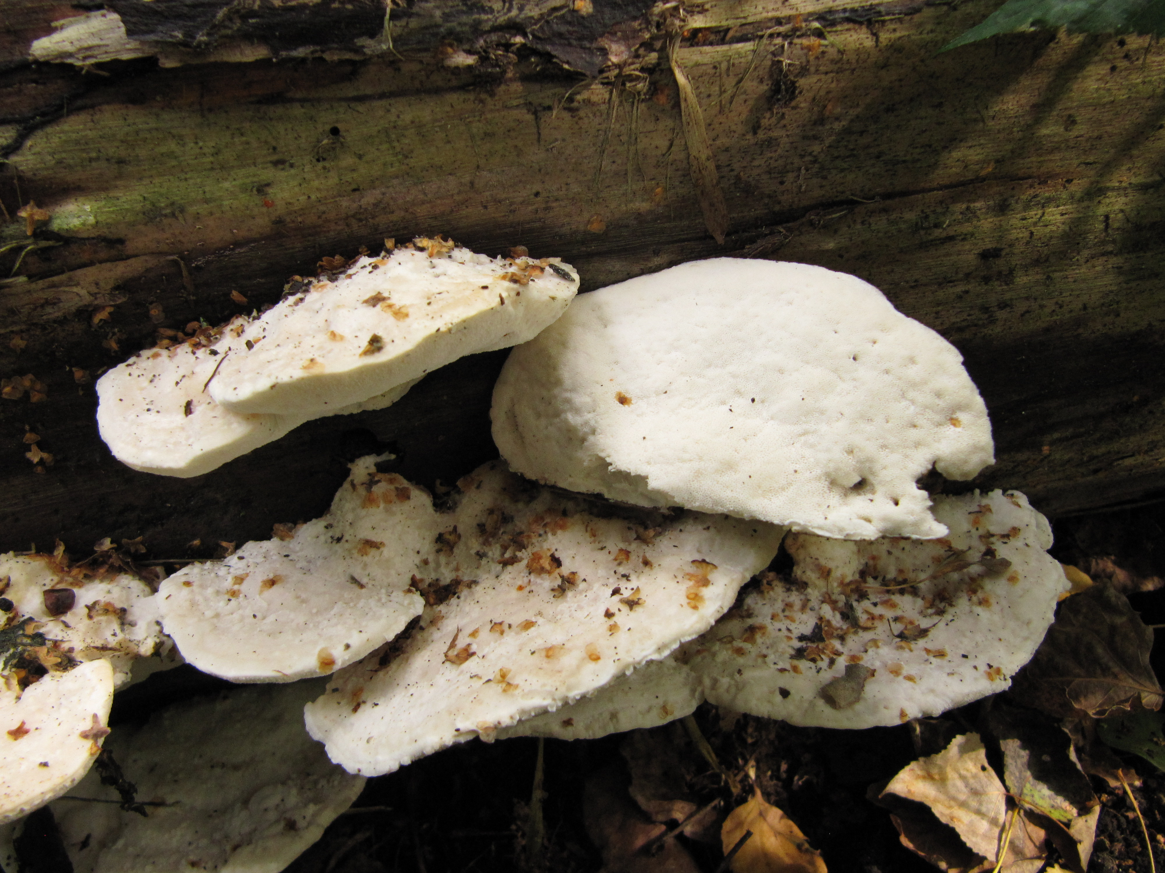 Grauweißer Saftporling (Postia lactea syn. Oligoporus lacteus, P. tephroleuca, O. tephroleucus)